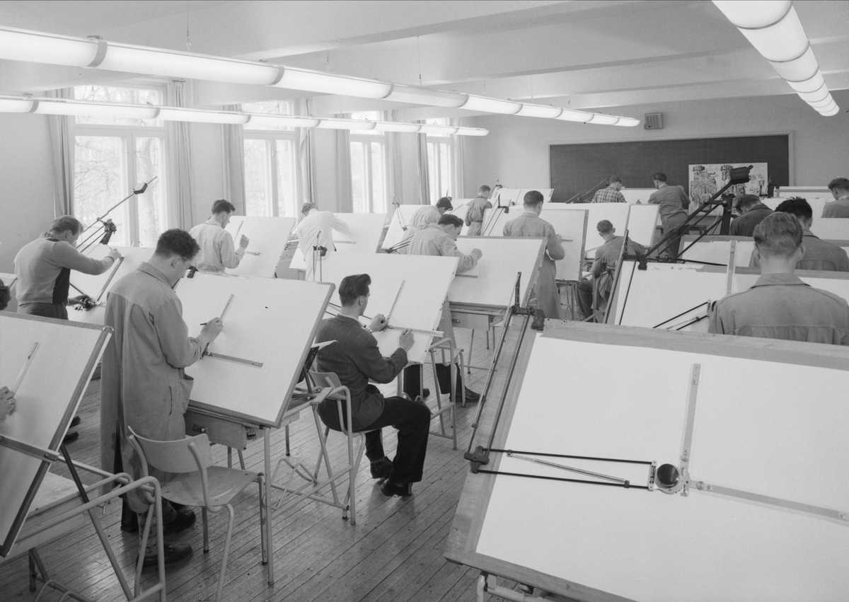 Horten tekniske skole, interiør,tegnesal, tegnebrett, elever